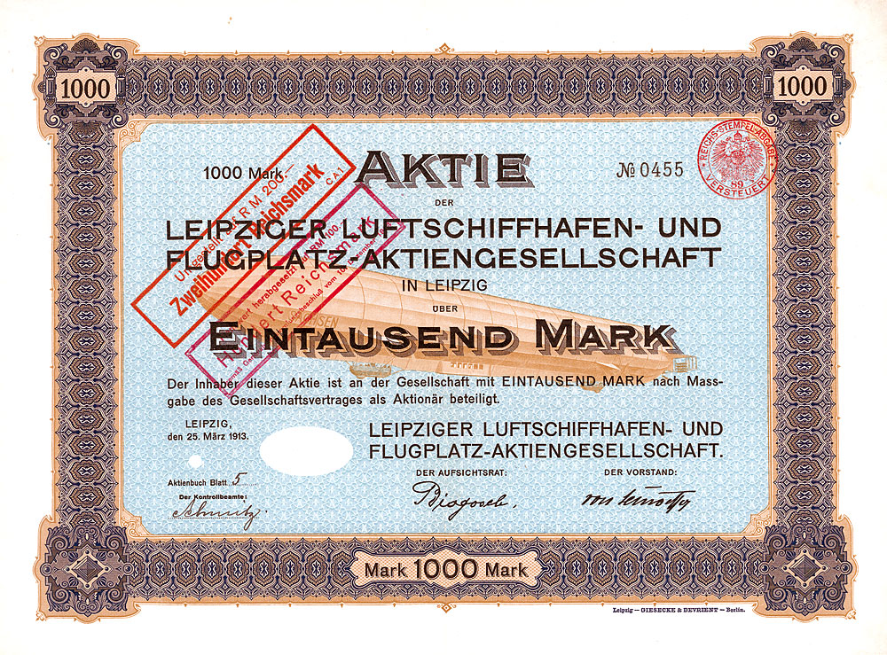 Aktie über 1000 Mark (Nr. 0455) von 1913 der Leipziger Luftschiffhafen- und Flugplatz-Aktiengesellschaft mit der Abbildung eines Zeppelin und dem Stempel Reichs-Stempel-Abgabe versteuert ...